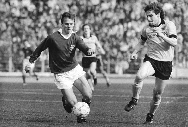 ADN-ZB-Mittelstädt-6.4.88-A-Berlin: Fußball-Oberliga- BFC Dynamo - SG Dynamo Dresden 1:0- Der Berliner Angriffsspieler Andreas Thom (l.), der vor 24 000 Zuschauern den einzigen Treffer erzielte, im Zweikampf mit Gästeverteidiger Andreas Trautmann.